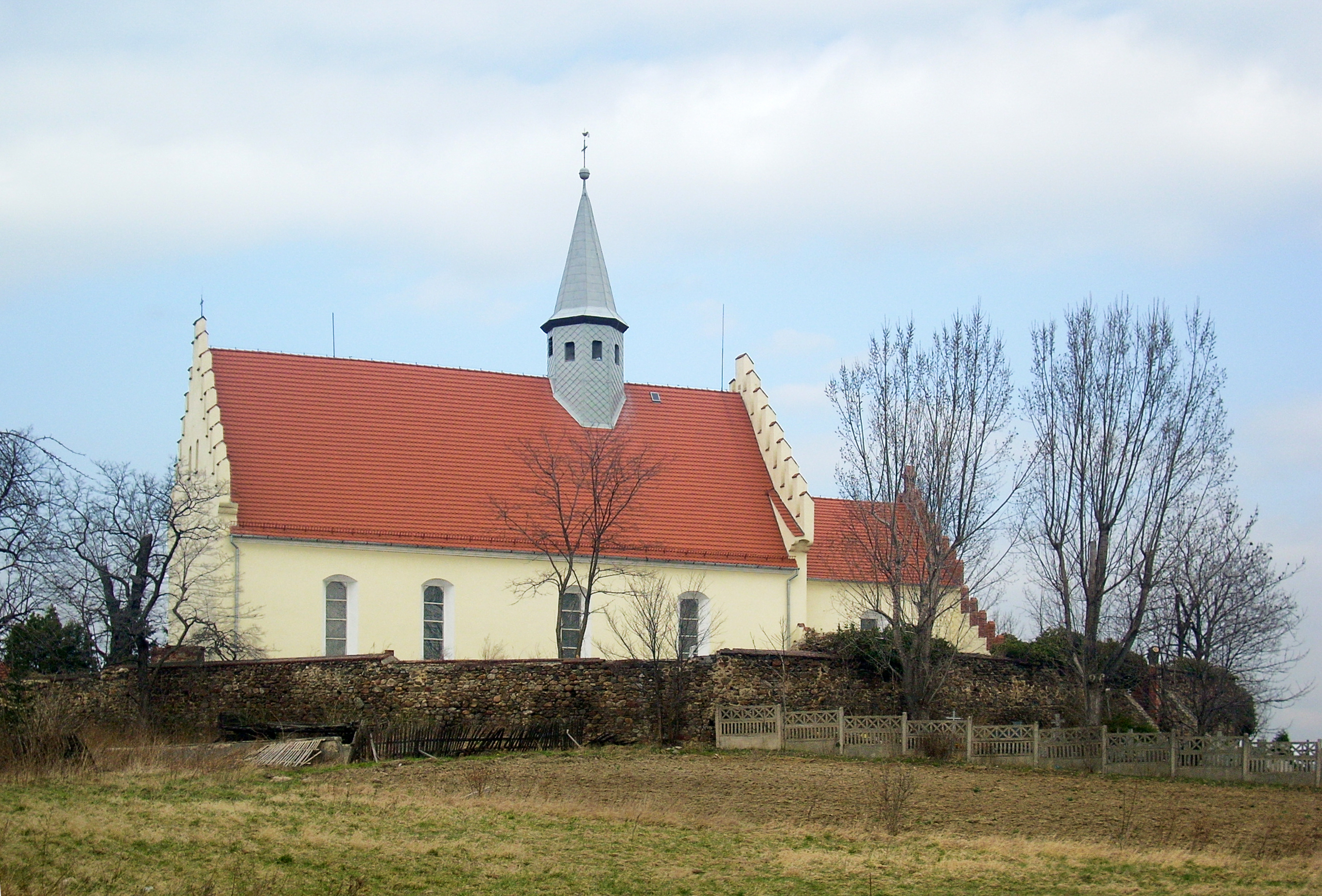 Lutomia Dolna - rzymskokatolicki kościół parafialny p.w. Przemienienia Pańskiego, XVI, XVII